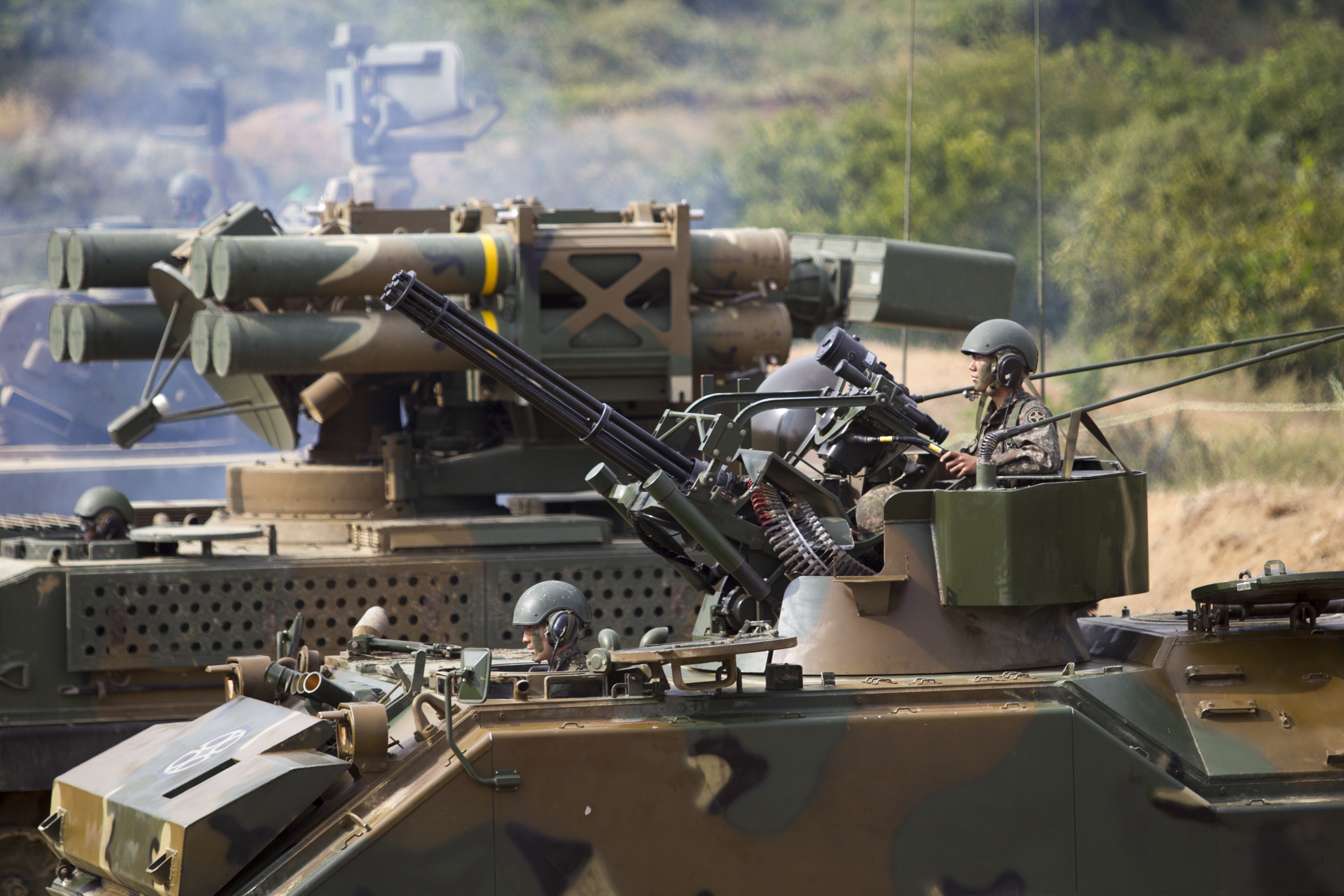 사진 - 정승익 육군 블로그 사진작가